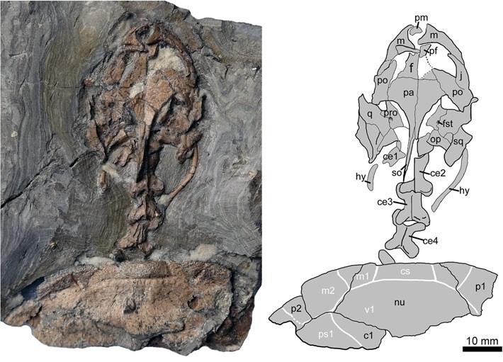 New material of Manchurochelys manchoukuoensis (PMOL-AR00180) in dorsal view, from the Early Cretaceous Jiufotang Formation of Qilinshan, Chifeng, Inner Mongolia, China. Abbreviations: c1, costal Plate 1; cs, cervical scale; ce1-4, cervical vertebrae 1-4; f, frontal; fst, foramen stapedio-temporale; hy, hyoid; m, maxilla; m1-2, marginal scales 1–2; nu, nuchal; op, opisthotic; p1-2, peripheral Plates 1–2; pa, parietal; pf, prefrontal; pm, premaxilla; po, postorbital; pro, prootic; ps1, pleural scale 1; q, quadrate; so, supraoccipital; sq, squamosal; v1, vertebral scale 1.